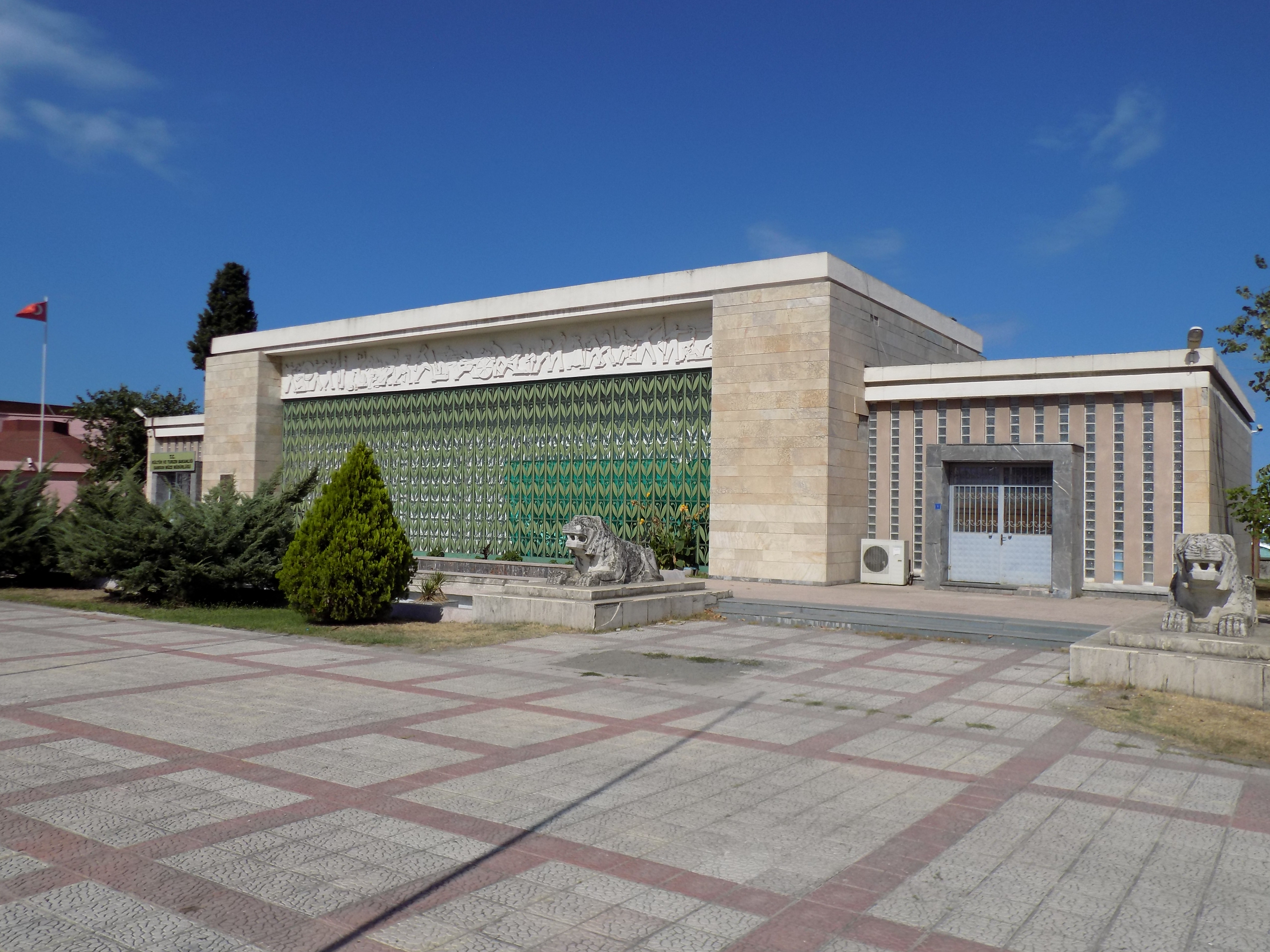 1975 yılında kullanıma geçen Samsun Arkeoloji ve Etnografya Müzesi binası.